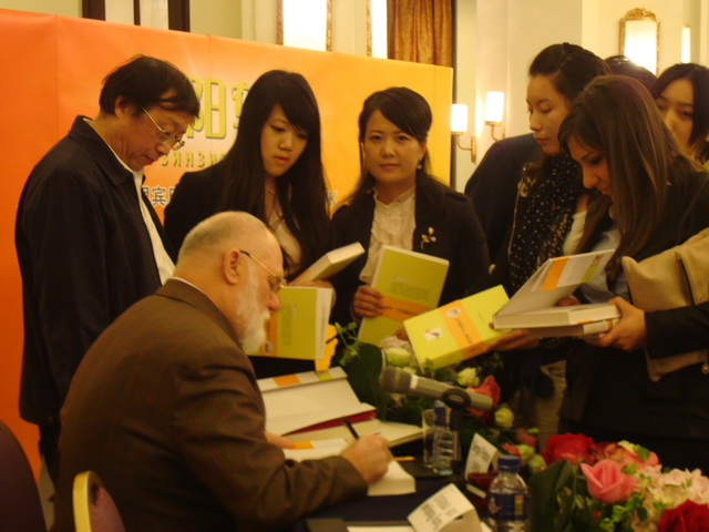 Презентация